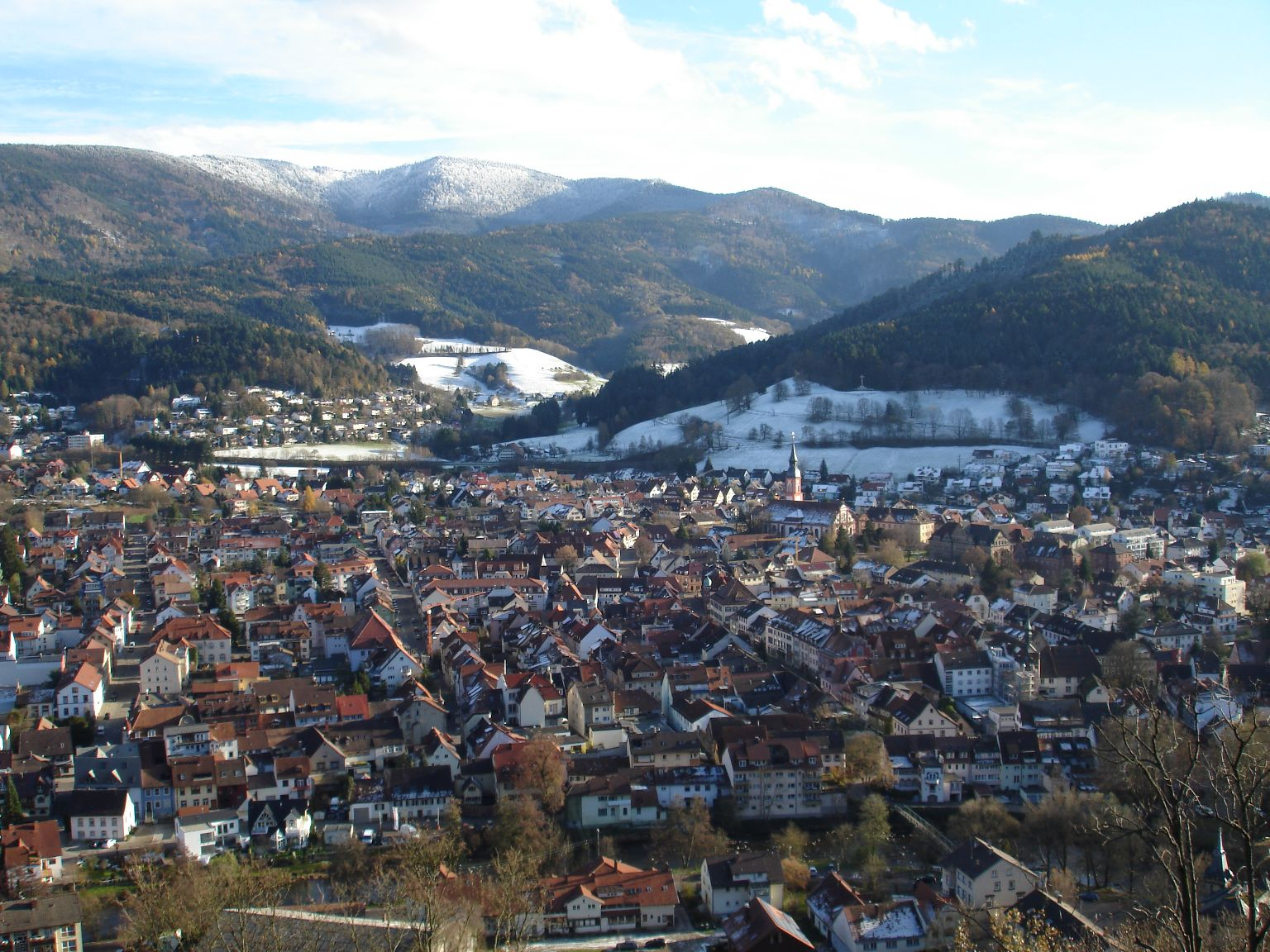 Waldkirch von der Kastelburg (über dem Bahnhof) gesehen